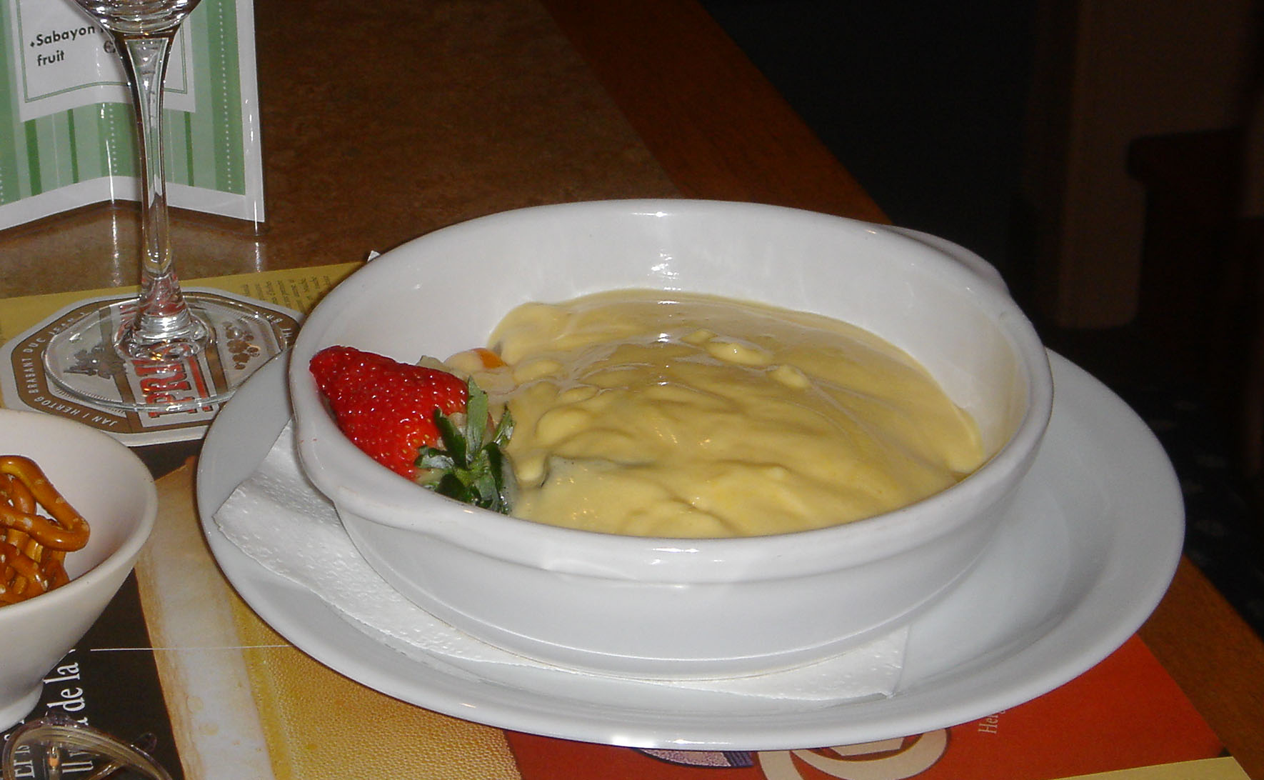 Dessert zabaglione of sabayon.